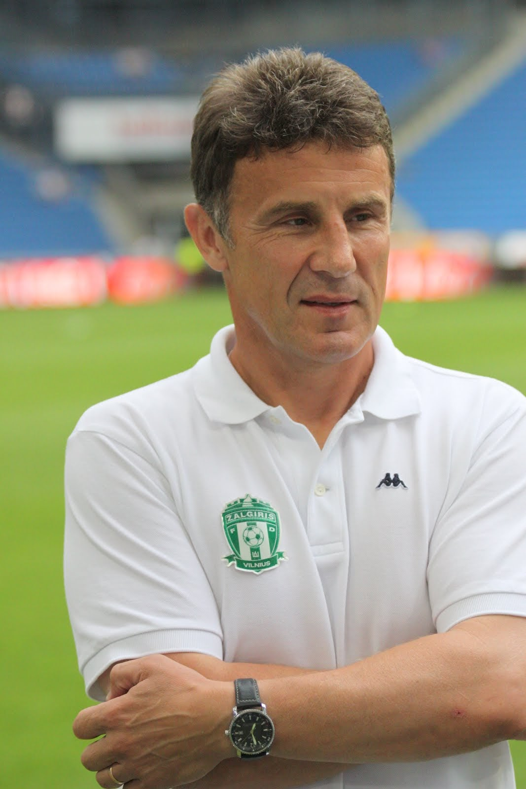 Marek Zub jako trener Żalgirisu Wilno.